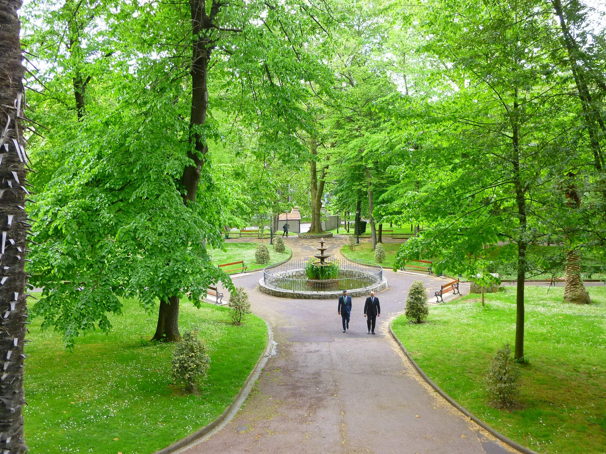 Jardines de la Santa y Real Casa de la Misercordia (Bilbao)